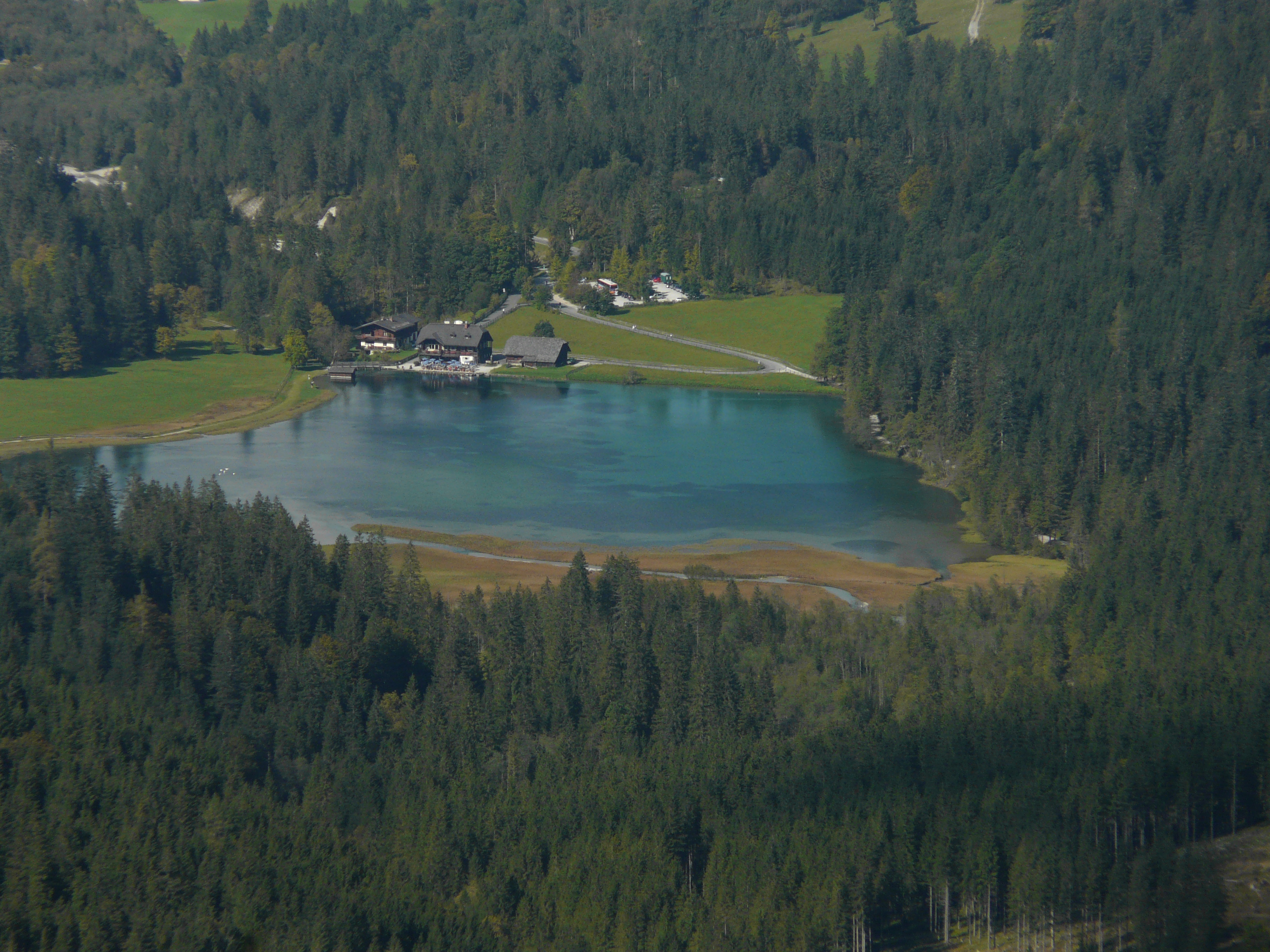 Der im südlichen Teil des Kleinartals gelegene Jägersee in den Radstädter Tauern